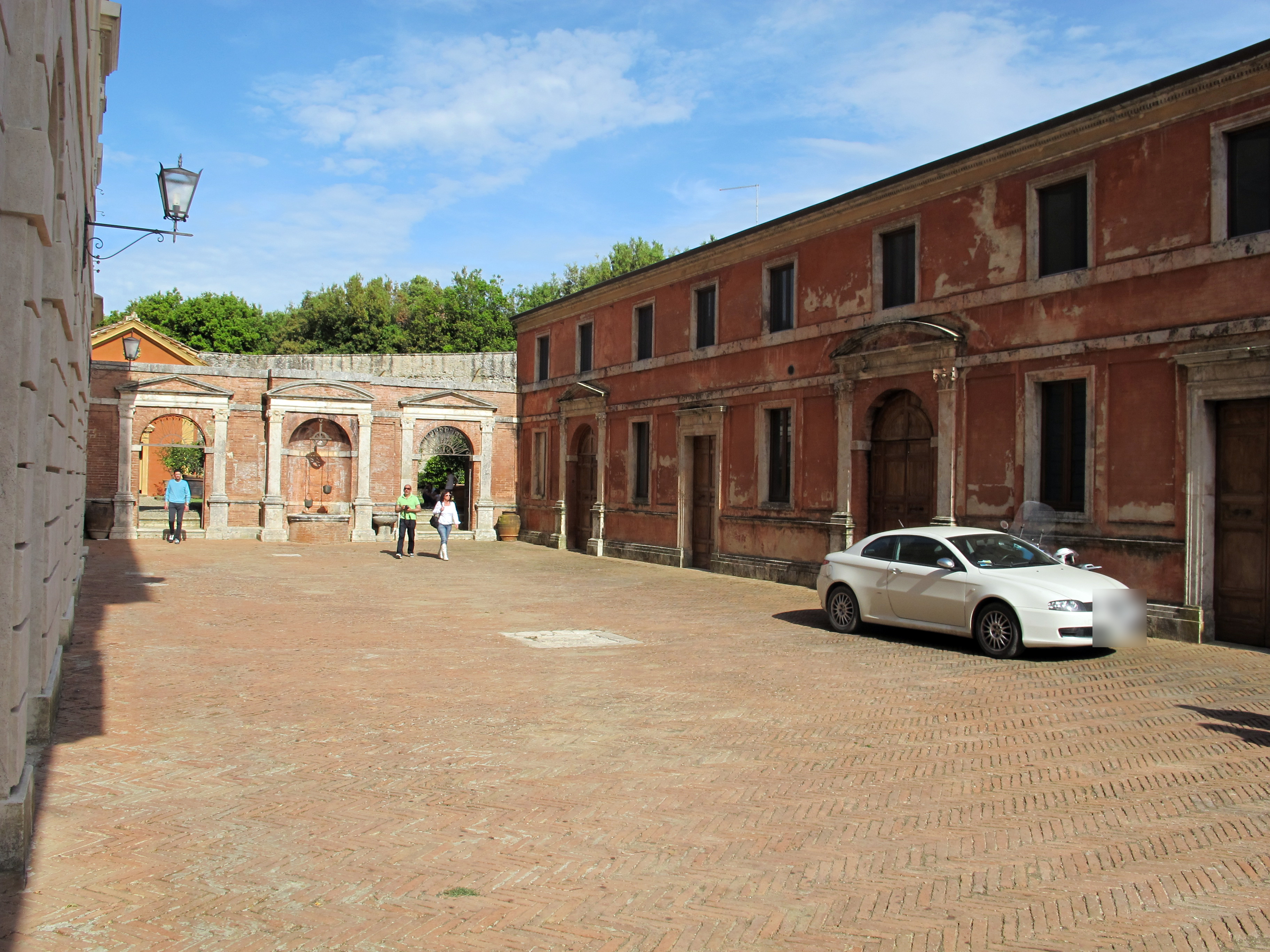 Castello di Belcaro - Siena